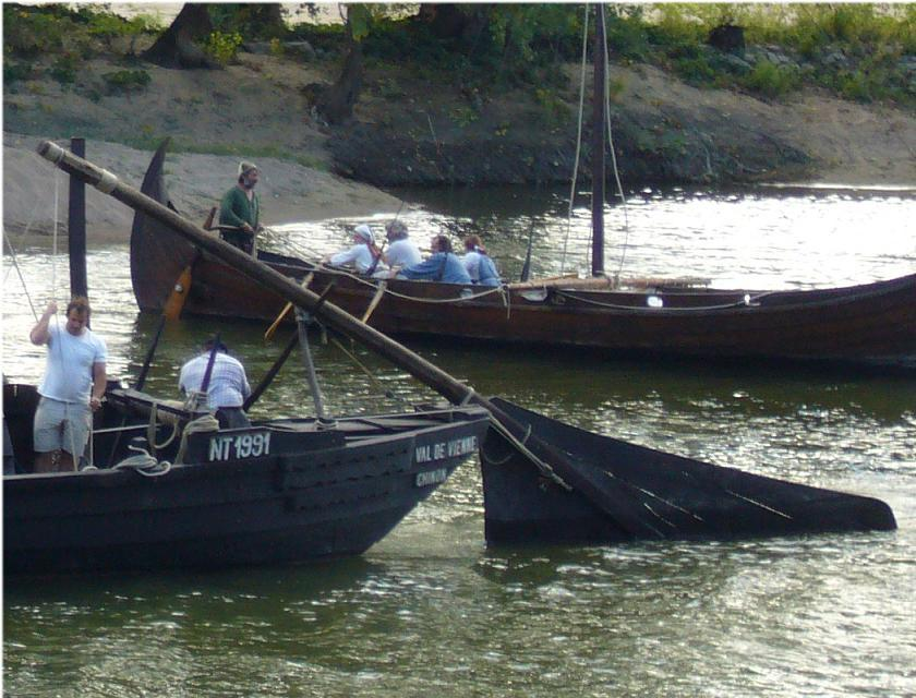 Gouvernail spécifique aux bateaux de Loire : la « piautre ».